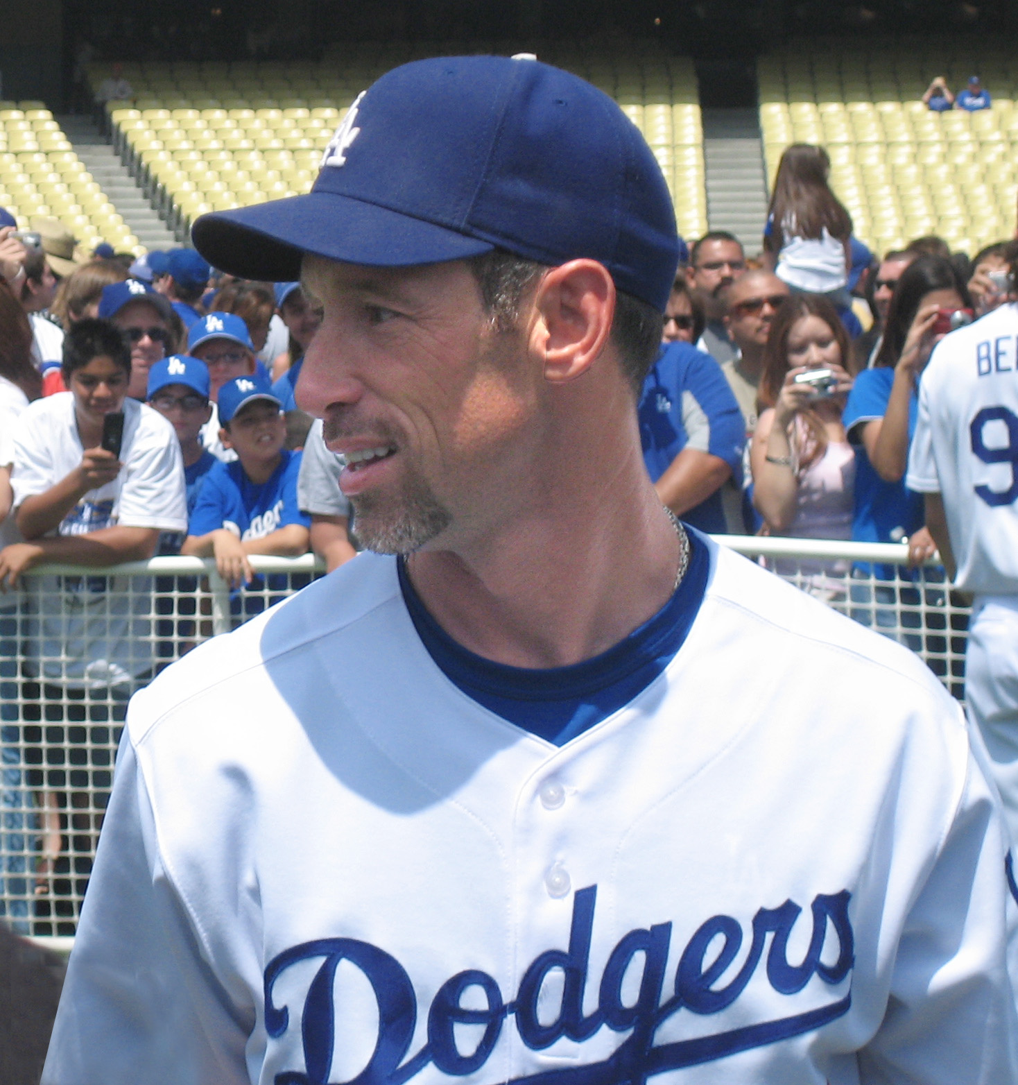 Luis Gonzalez taken at Dodger Stadium 5/27/2007 by mrquizzical Photo de Luis Gonzalez sous le maillot des Dodgers de Los Angeles, prise le 27 mai 2007 par mrquizzical